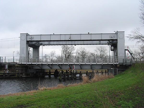 Foto gemaakt op nl:30 januari nl:2005 door Gerard Hogervorst. De brug ligt in de spoorbaan Alkmaar - Heerhugowaard over het kanaal van Omval naar Kolhorn.